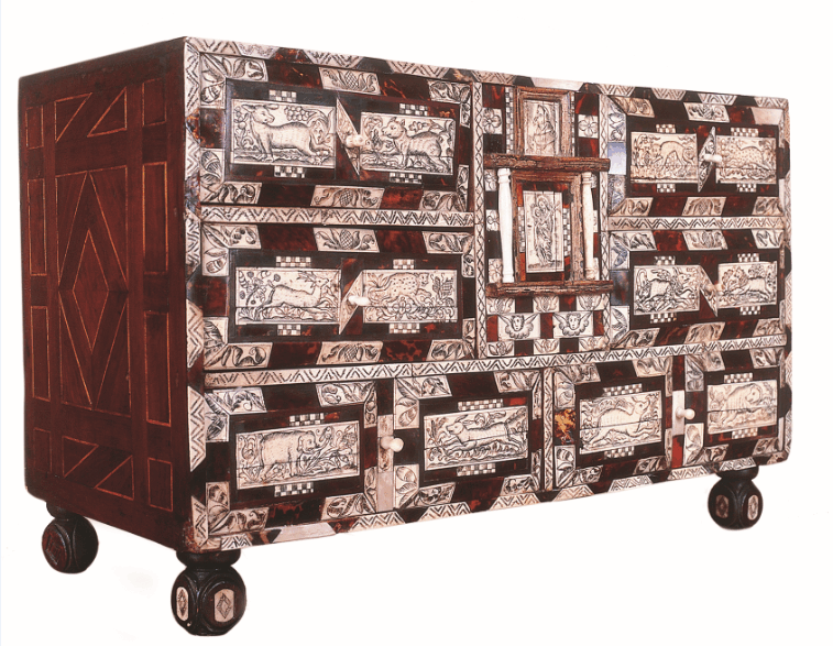 imagen de un braguero del museo colonial santa clara